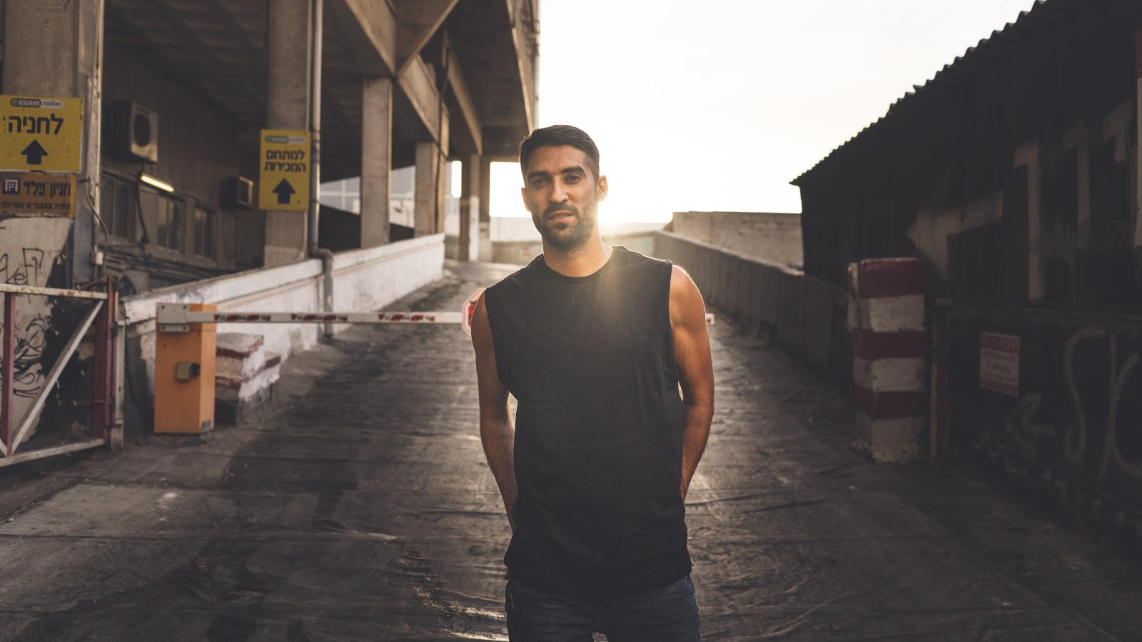 עידן חיים, זמר